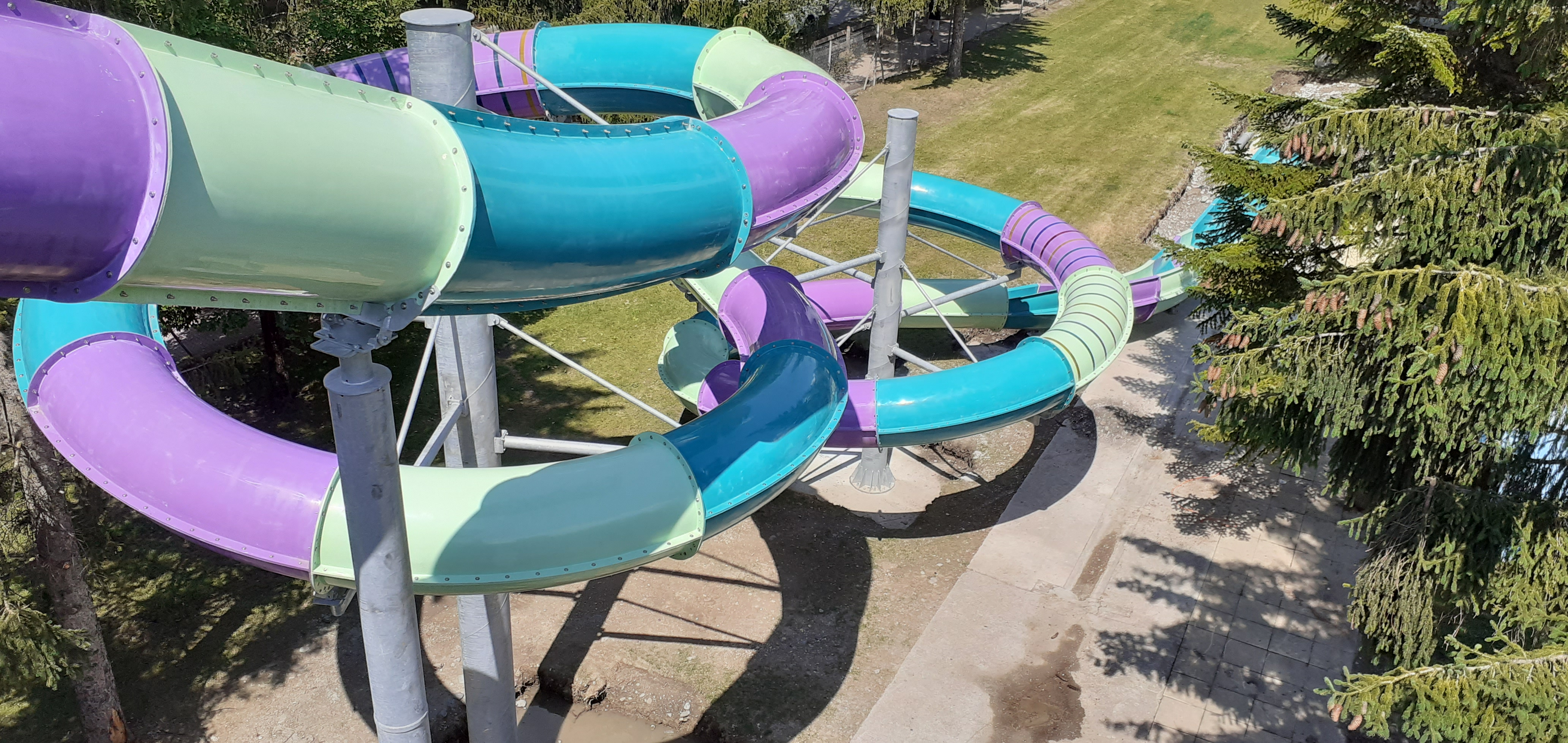 Aquatube Kaydırak ile ilgili Poolifes tarafından Fransa da yapılmış bir proje.